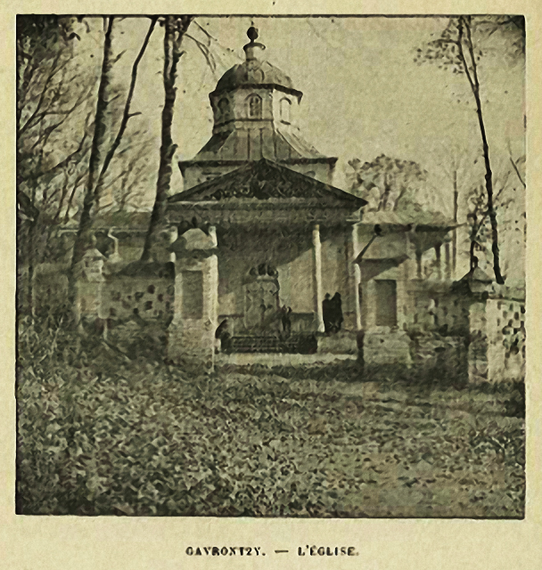 Церква в селі Гавронці